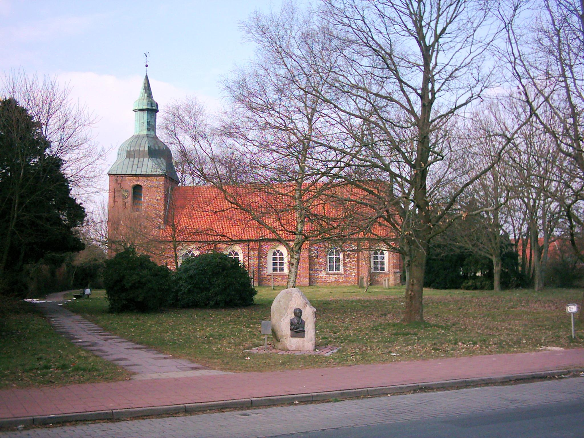 St. Marienkirche in Loxstedt, 2004